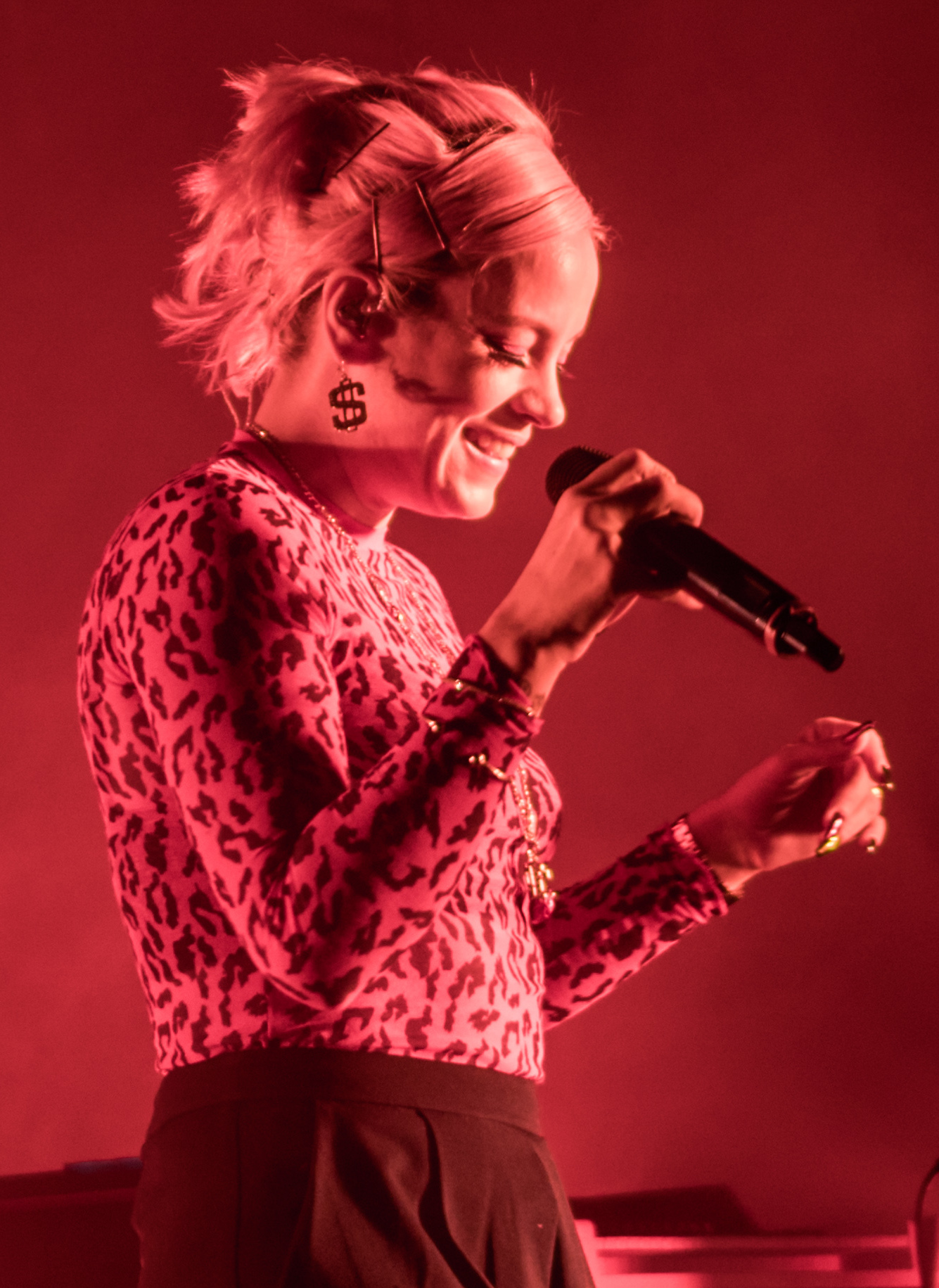 LilyTufnell210318